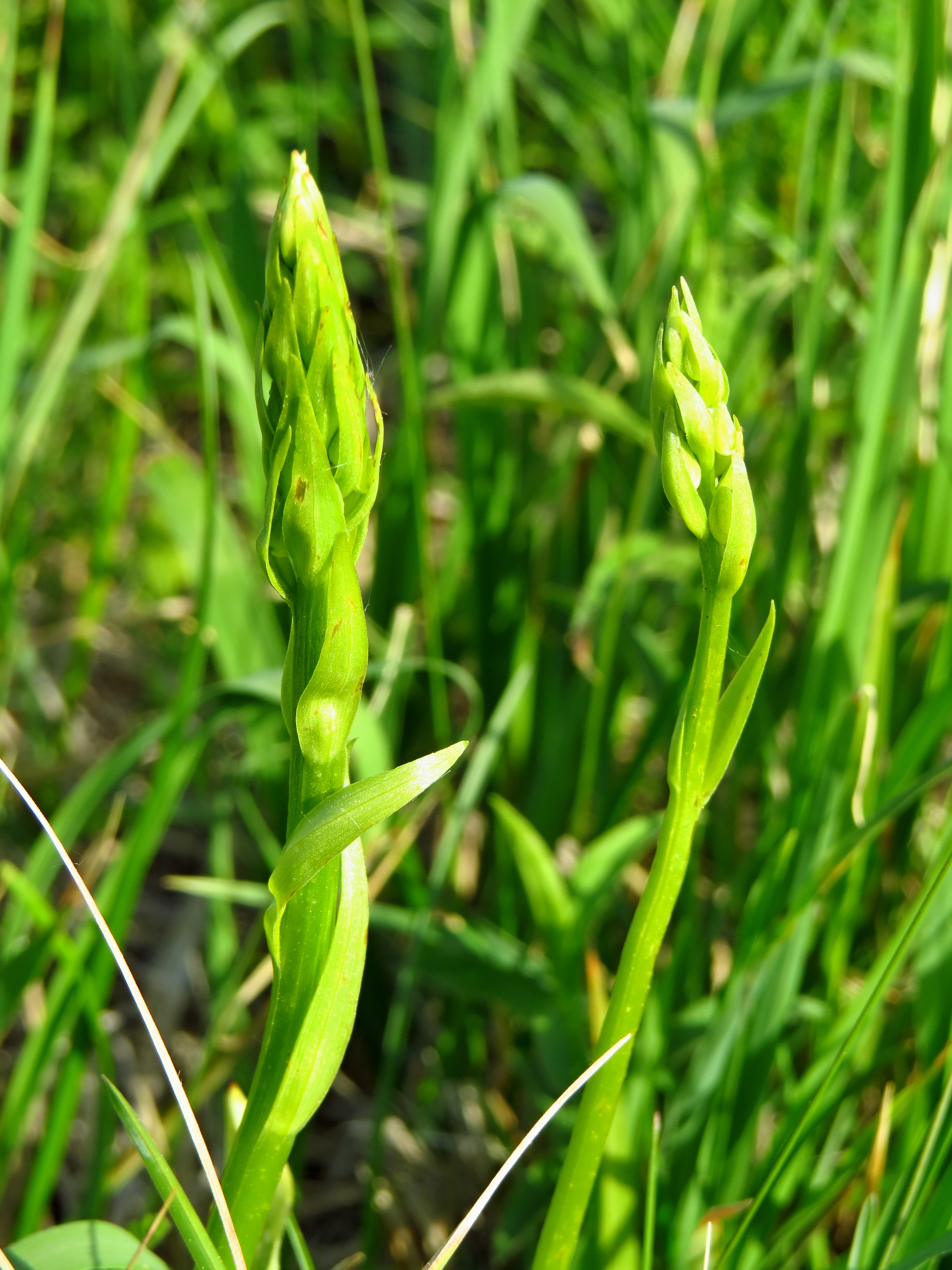 Stonek zatím nevykvetlého vemeníku dvoulistého (Platanthera bifolia) Project: Chráněná území